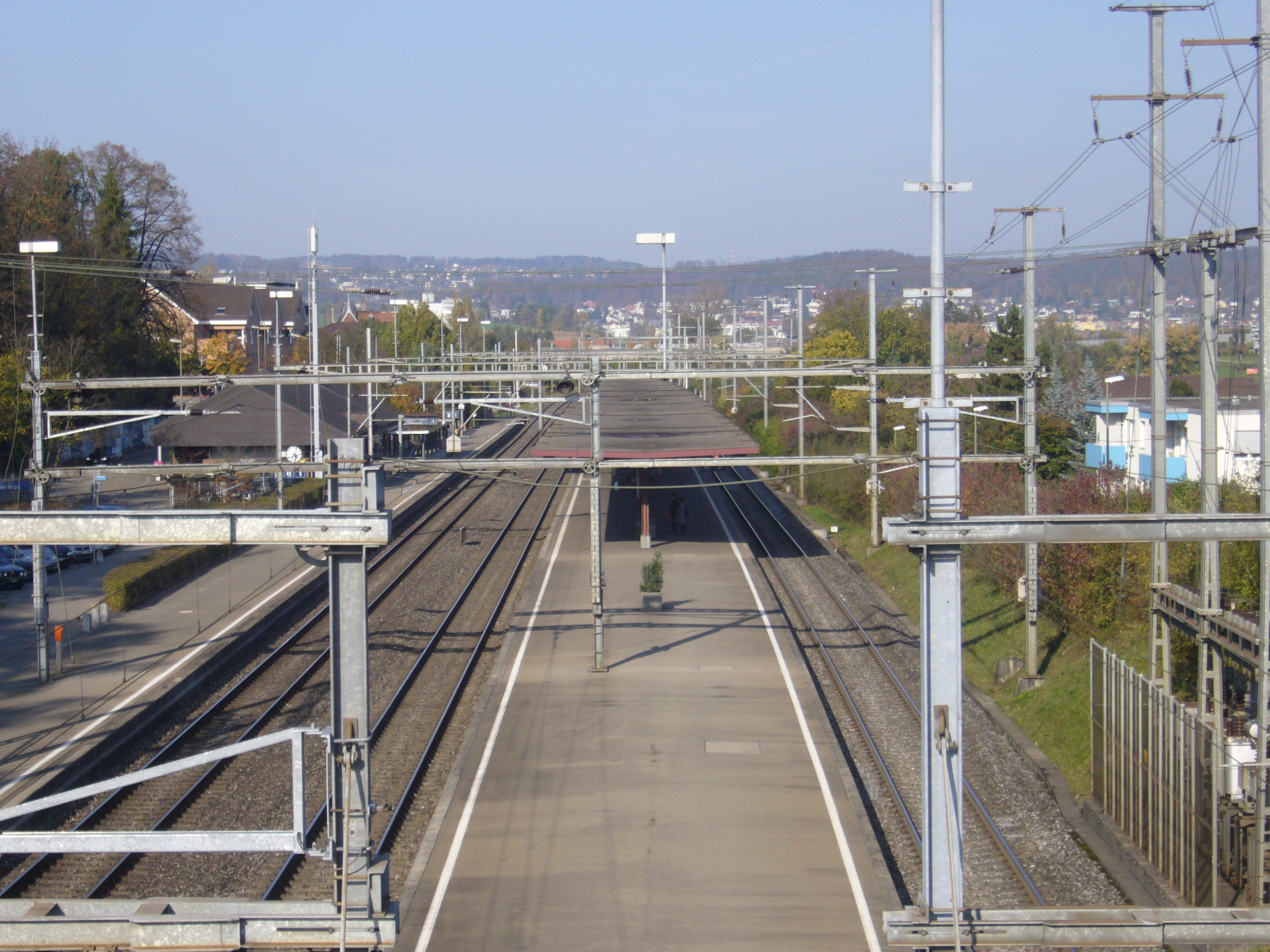 Blick vom Bahnbrüggli über die Station Dietlikon.